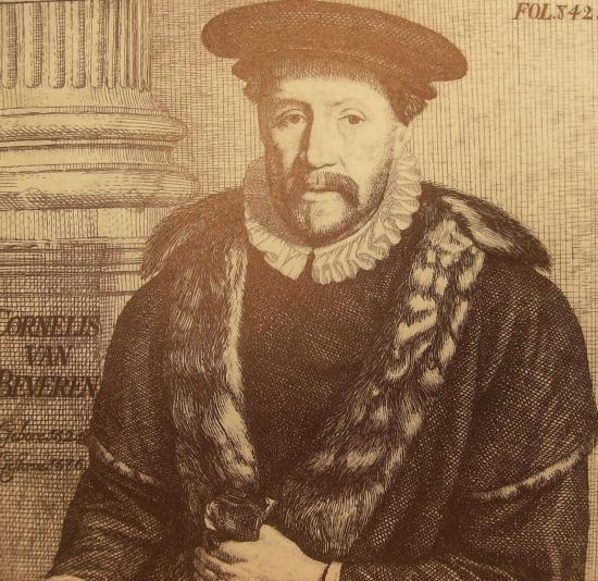 Cornelis van Beveren (1524-1586)